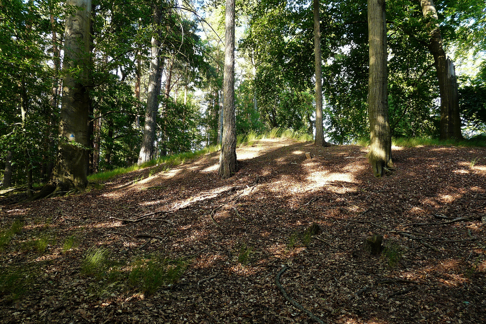 Vrchol Větráku pod hranou lomu